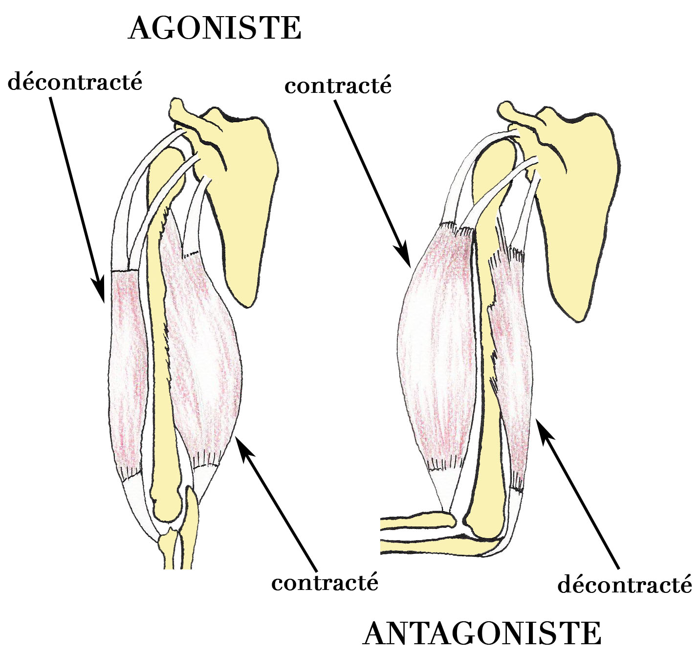 Yoga anatomie